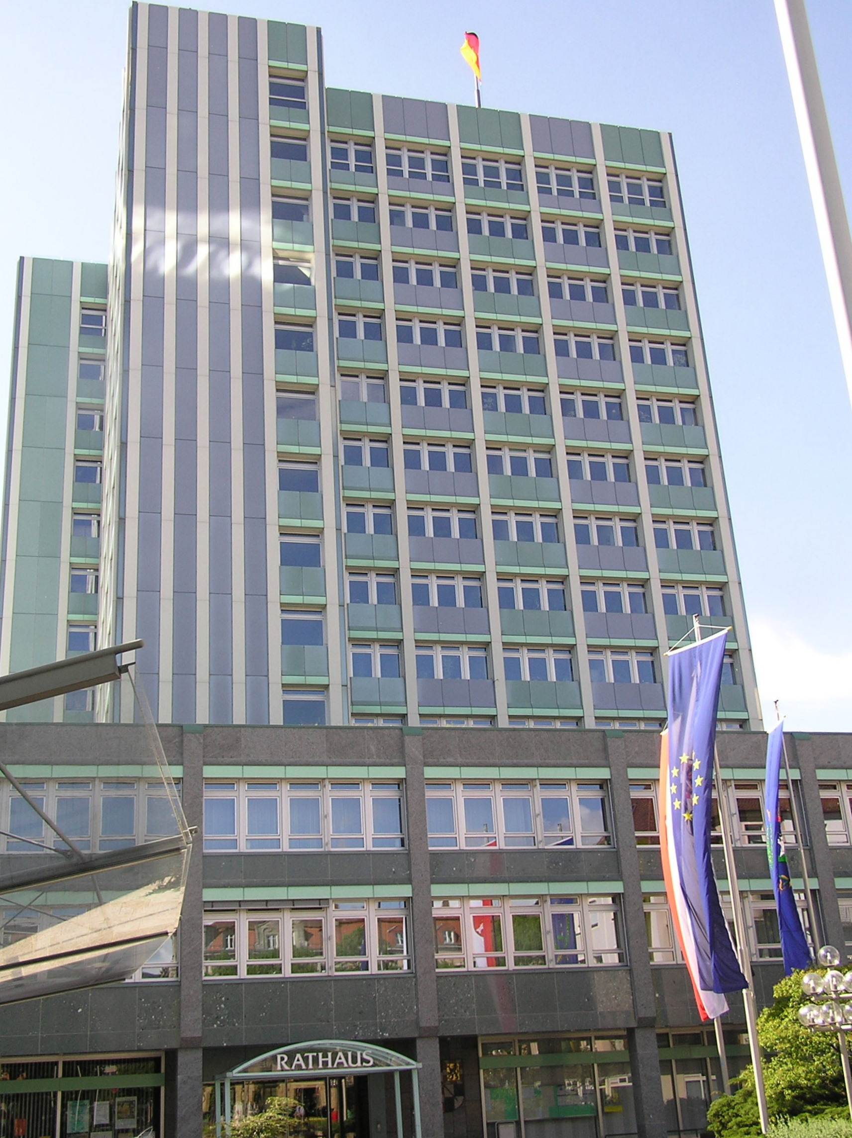 Bayreuth, Neues Rathaus Fotografiert am 5. Mai 2005